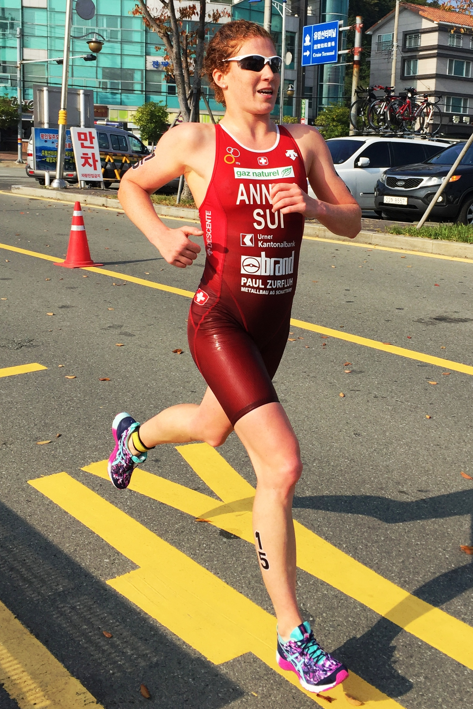 Jolanda Annen am Triathlon Weltcup Tongyeong 2015